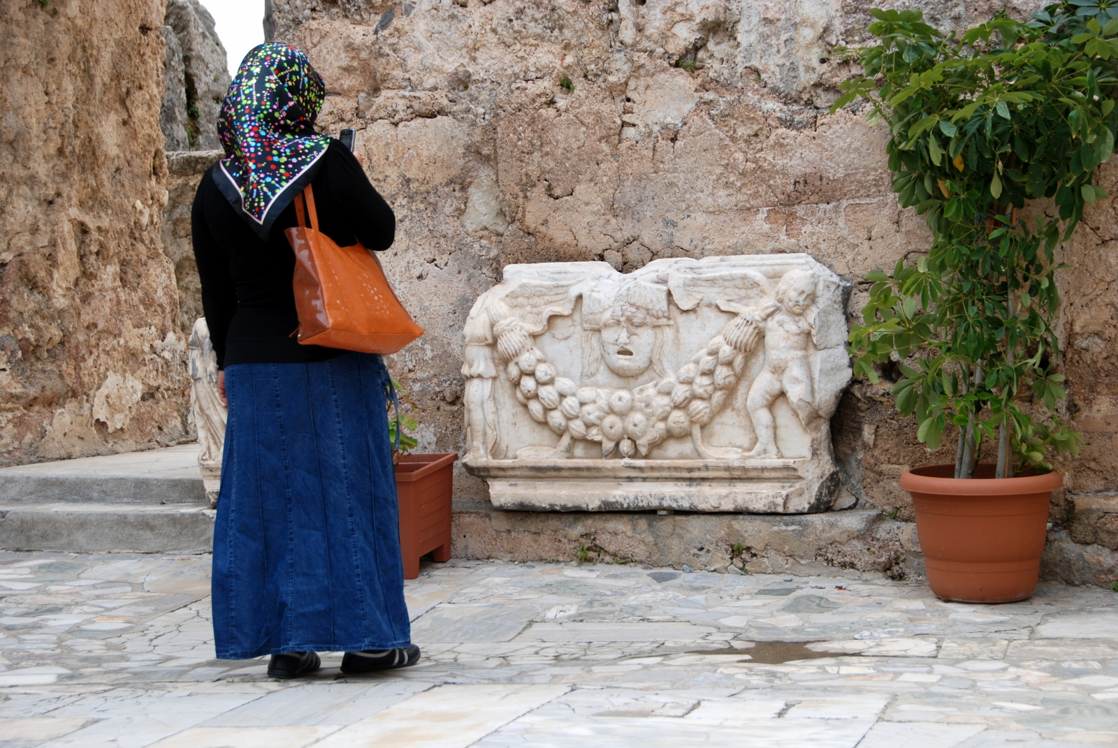 Bosonders gut erhaltene Exponate finden sich im Museum.